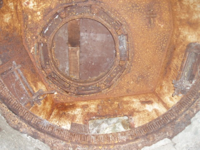 Intérieur d'une tourelle de Panzerkampfwagen II, transformée en table d'orientation, à Castelvielh, prés de Luchon